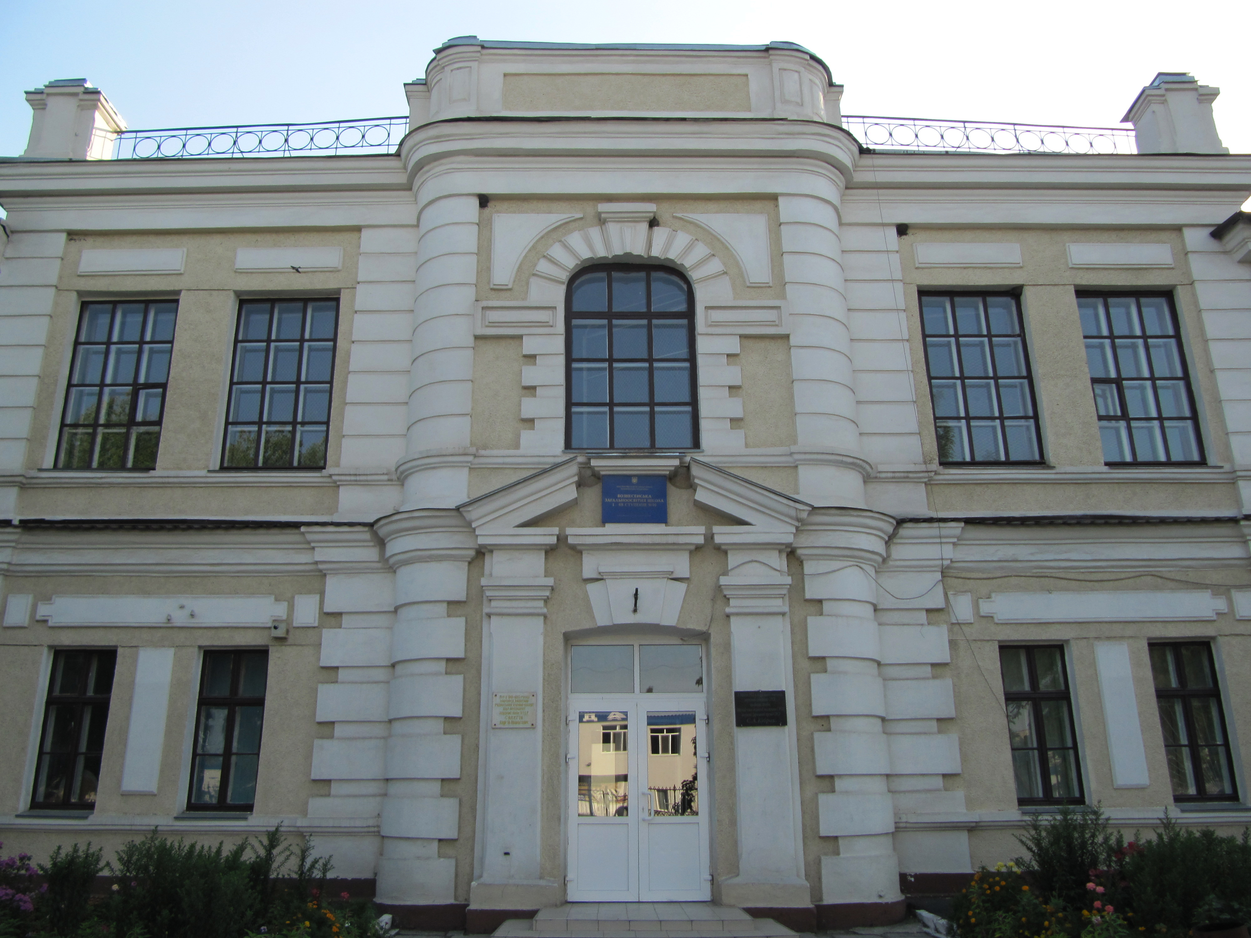 Вознесенськ, школа де навчалися академік Сапєгін та художник-графік Кібрик, Миколаївська весна у Вікіпедії